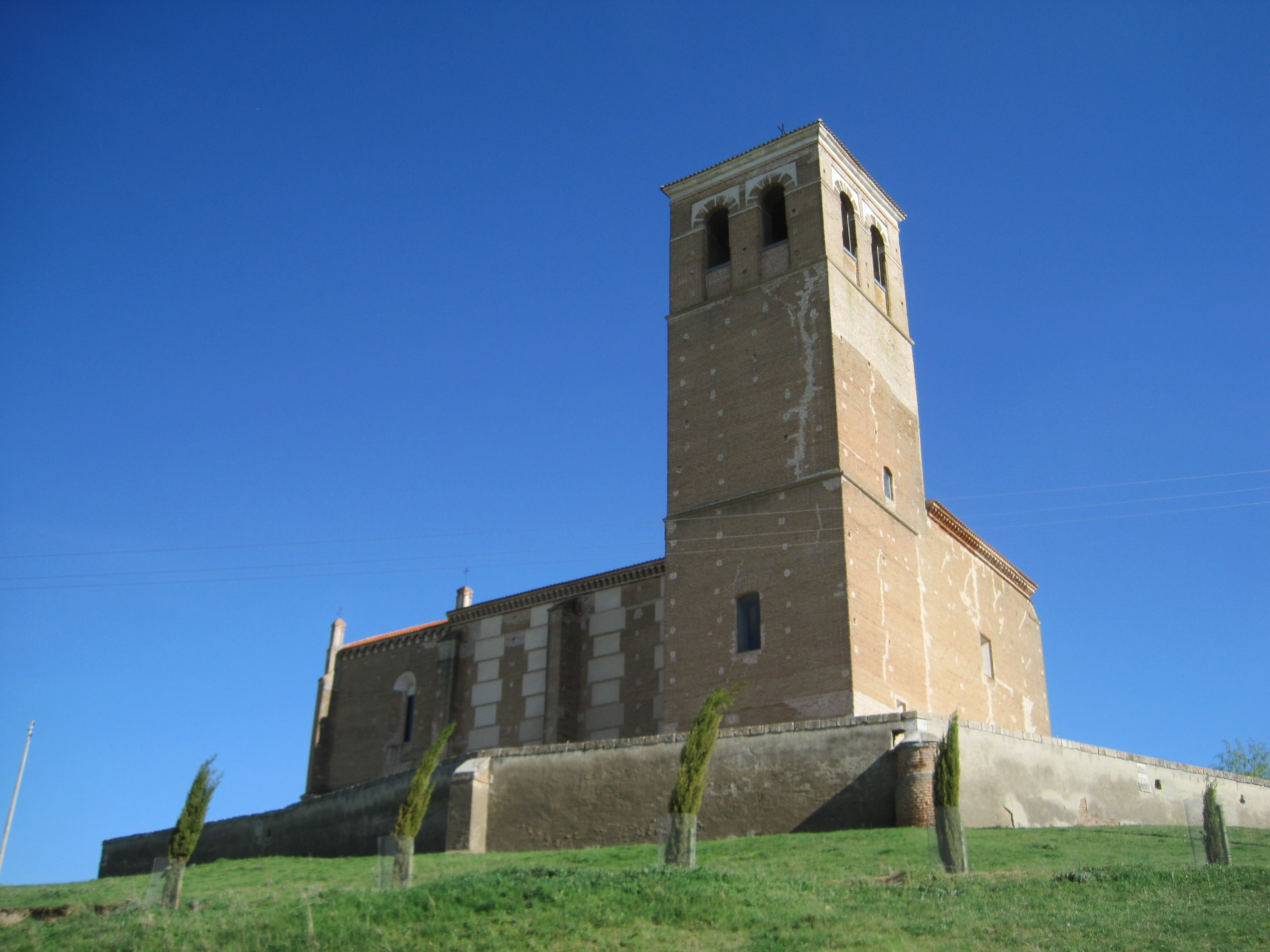 Vista general de la iglesia de Ventosa de la Cuesta (Valladolid, España).